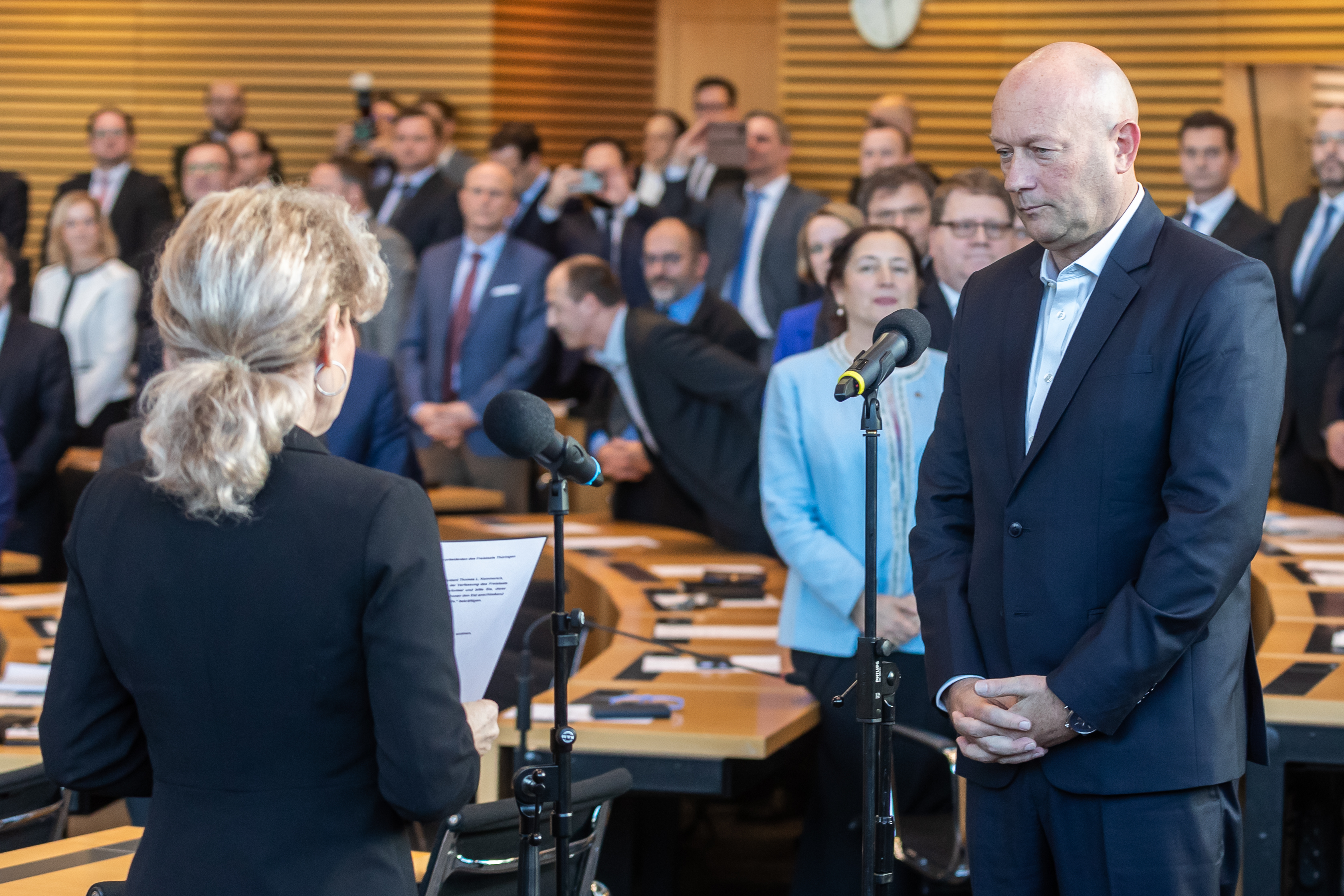 Thüringer Landtag, Wahl des Ministerpräsidenten: Birgit Keller (Die Linke, Landtagspräsidentin) vereidigt Thomas L. Kemmerich (FDP, Landes- und Fraktionsvorsitzender in Thüringen) als neugewählten Ministerpräsidenten